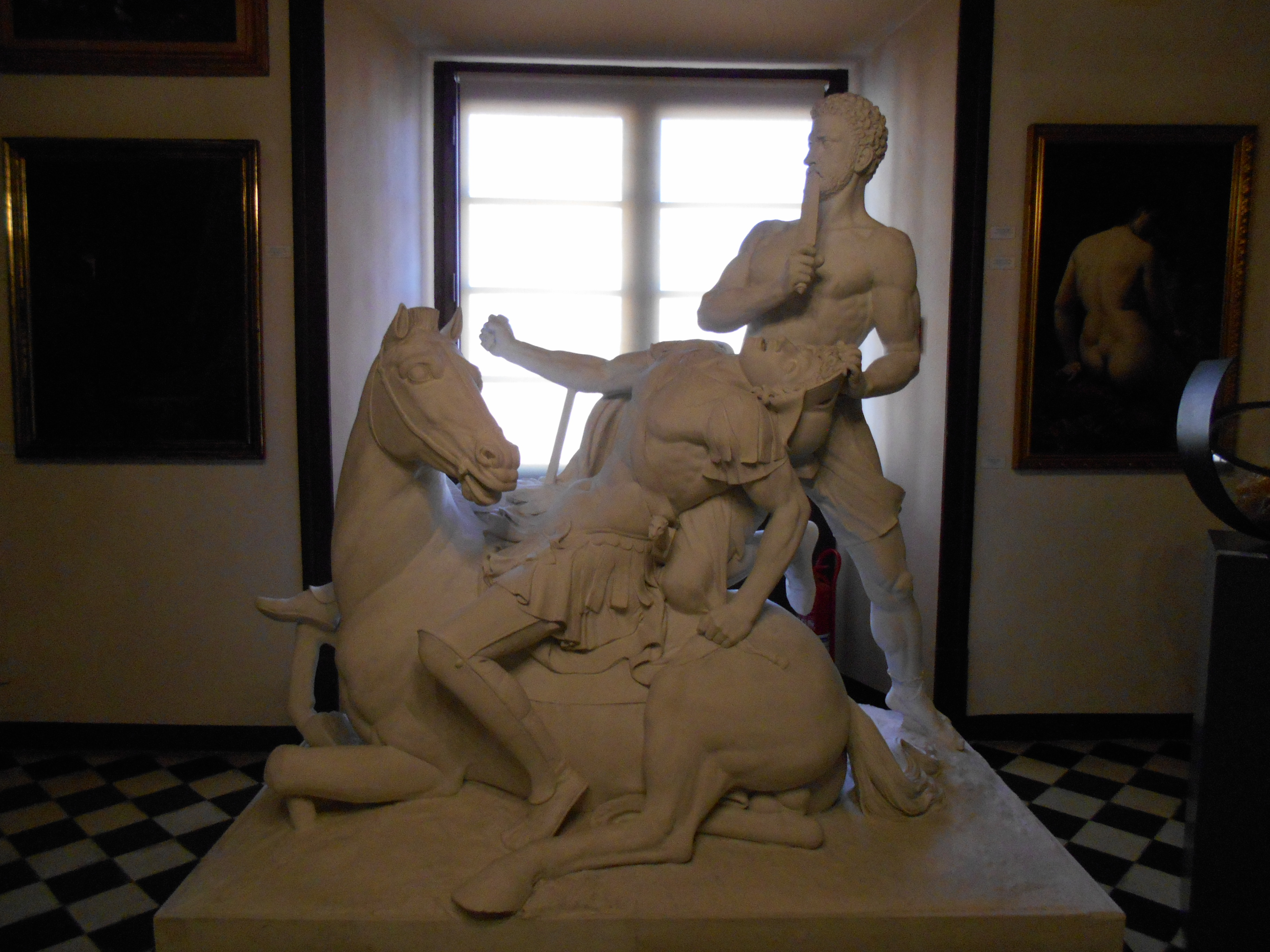 Almogáver matando un caballero francés (1836), de Damià Campeny, Reial Acadèmia Catalana de Belles Arts de Sant Jordi.